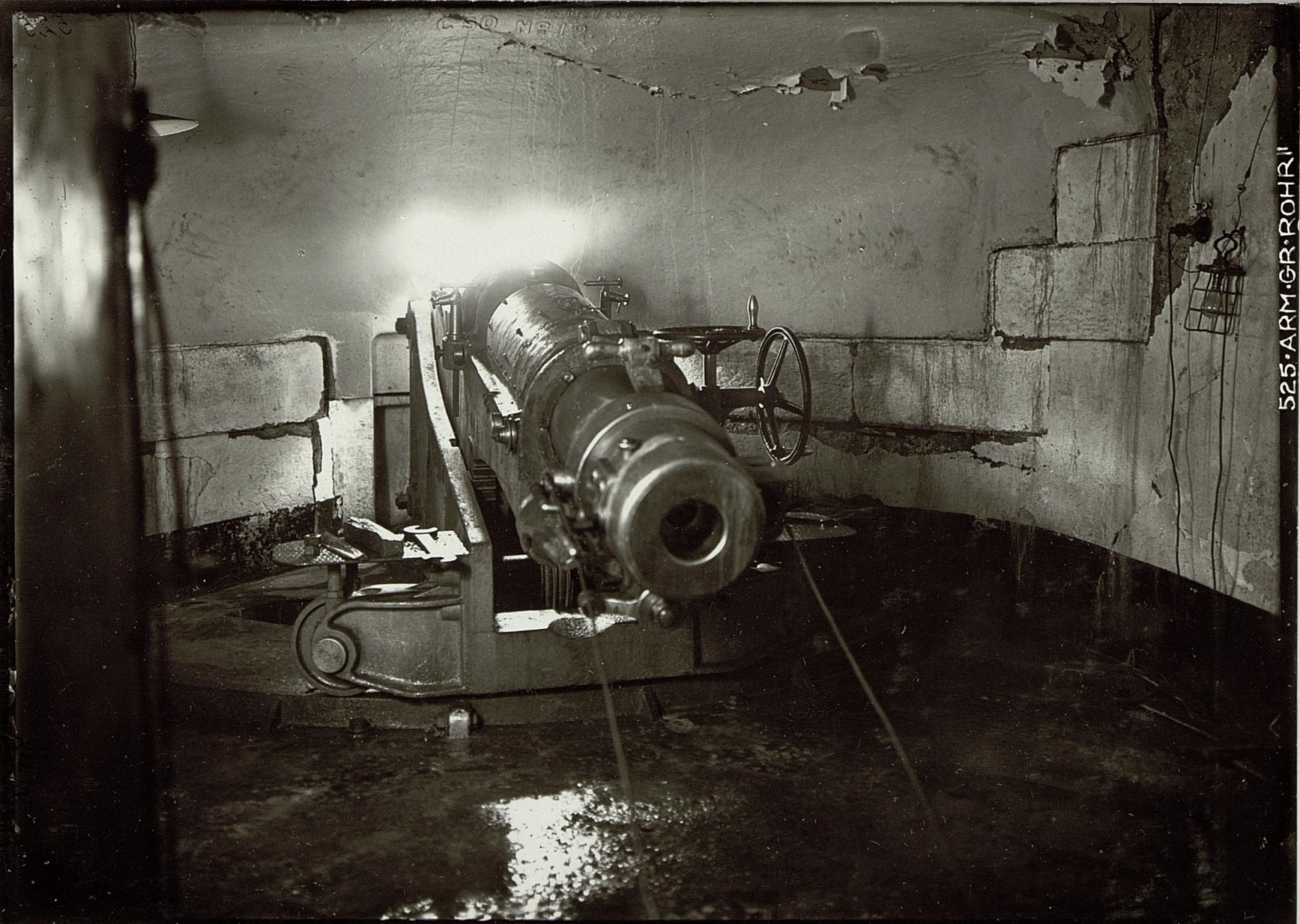 Fort Hermann. Das letzte noch intakte Geschütz des Werkes